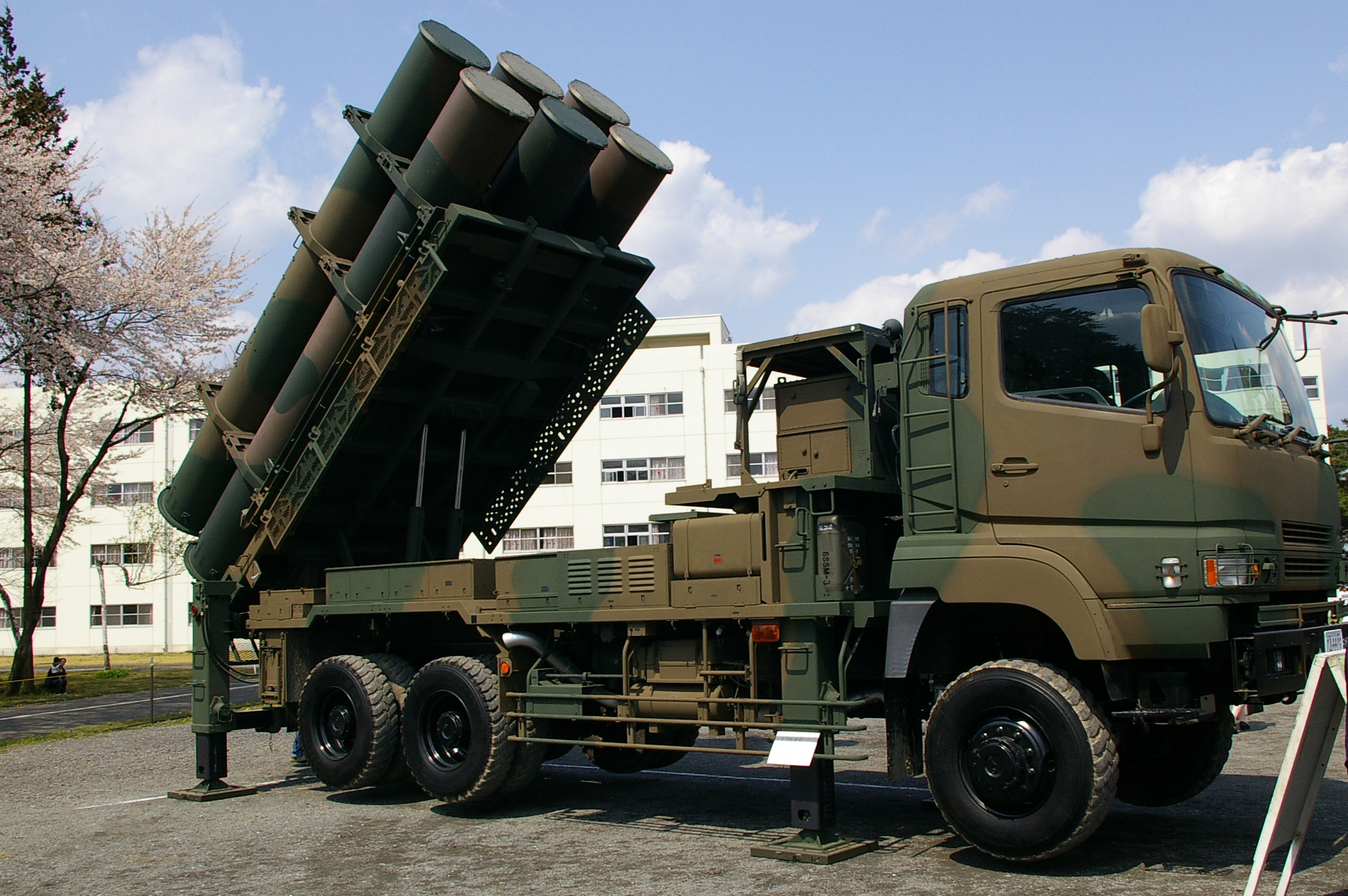 Taken by los688,8-Apr-2007,JGSDF Camp-Utsunomiya.JGSDF Type88 SSM.PD-self. ja:2007年4月8日、投稿者撮影。陸上自衛隊宇都宮駐屯地創立57周年記念行事。88式地対艦ミサイル、第6地対艦ミサイル連隊。